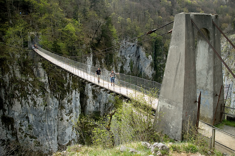 Holtzarte